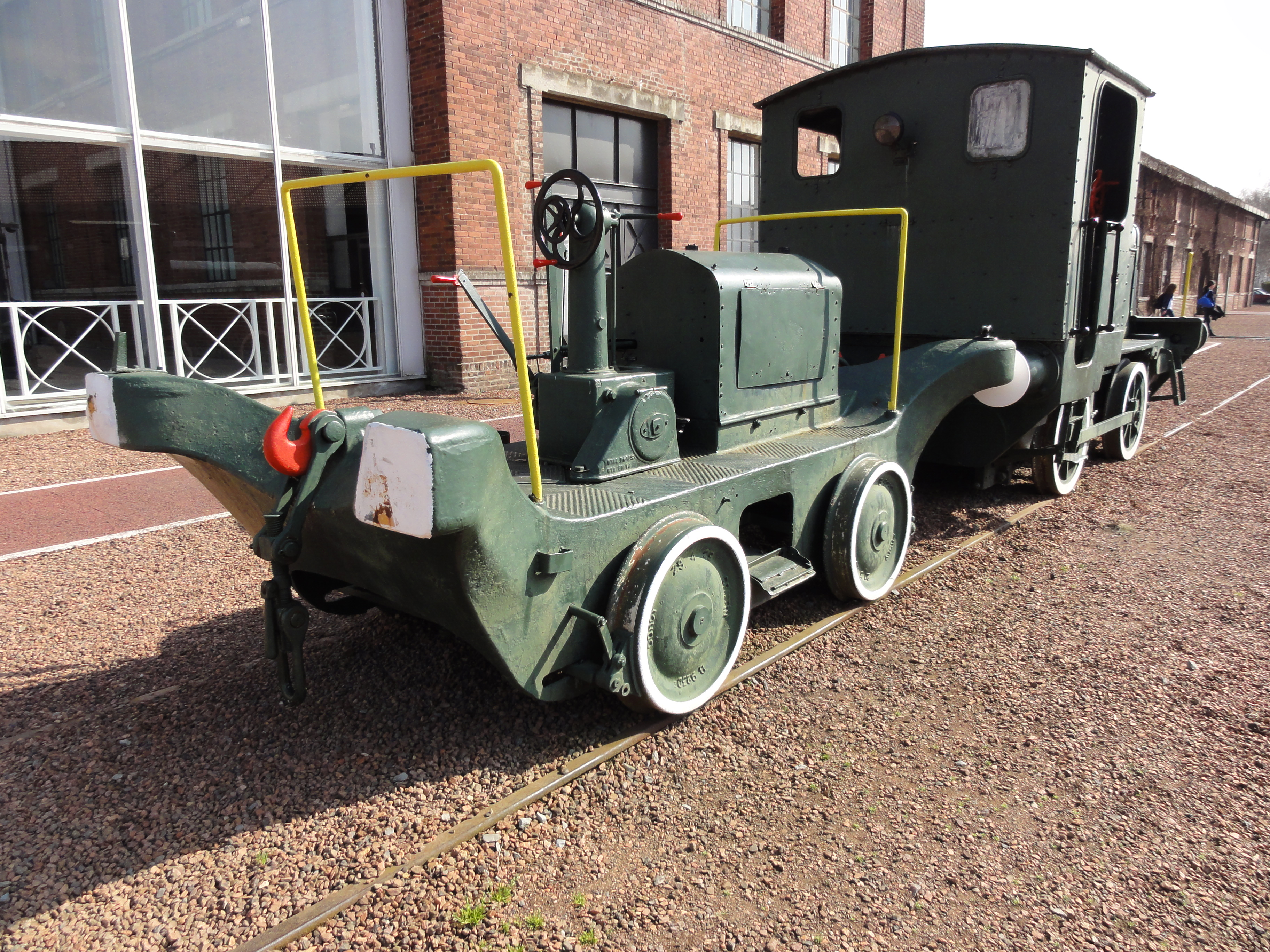 La Fosse Delloye de la Compagnie des mines d'Aniche était un charbonnage constitué de deux puits situé à Lewarde, Nord, Nord-Pas-de-Calais, France.